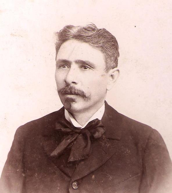 Profesor Rodolfo Menéndez de la Peña (1850-1928)